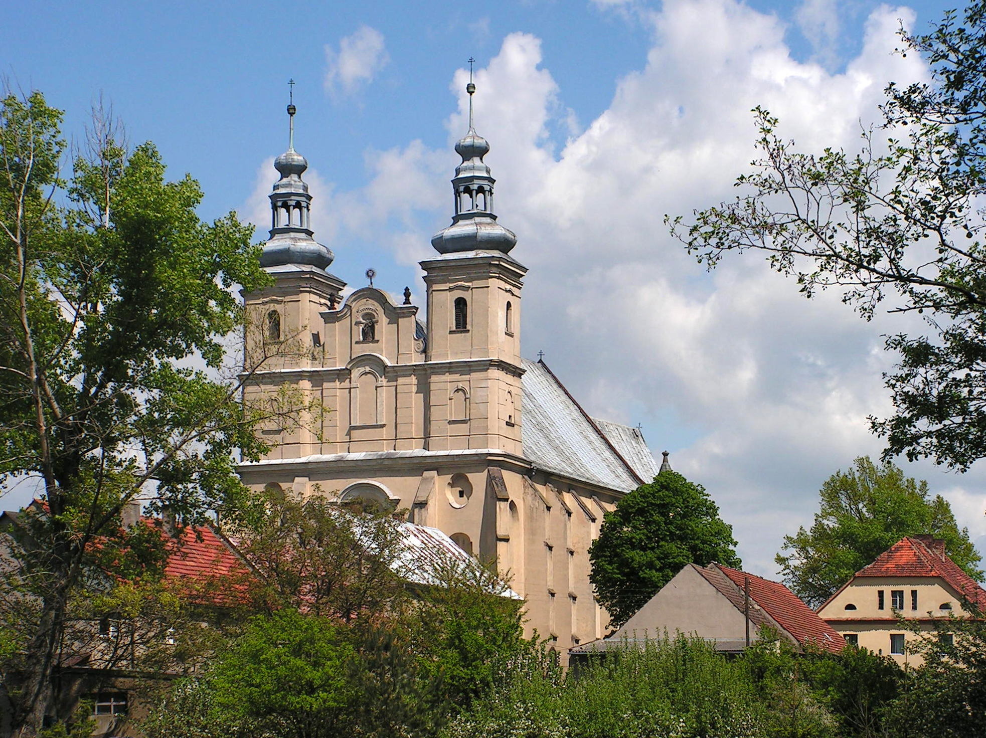 Bobolice sanktuarium